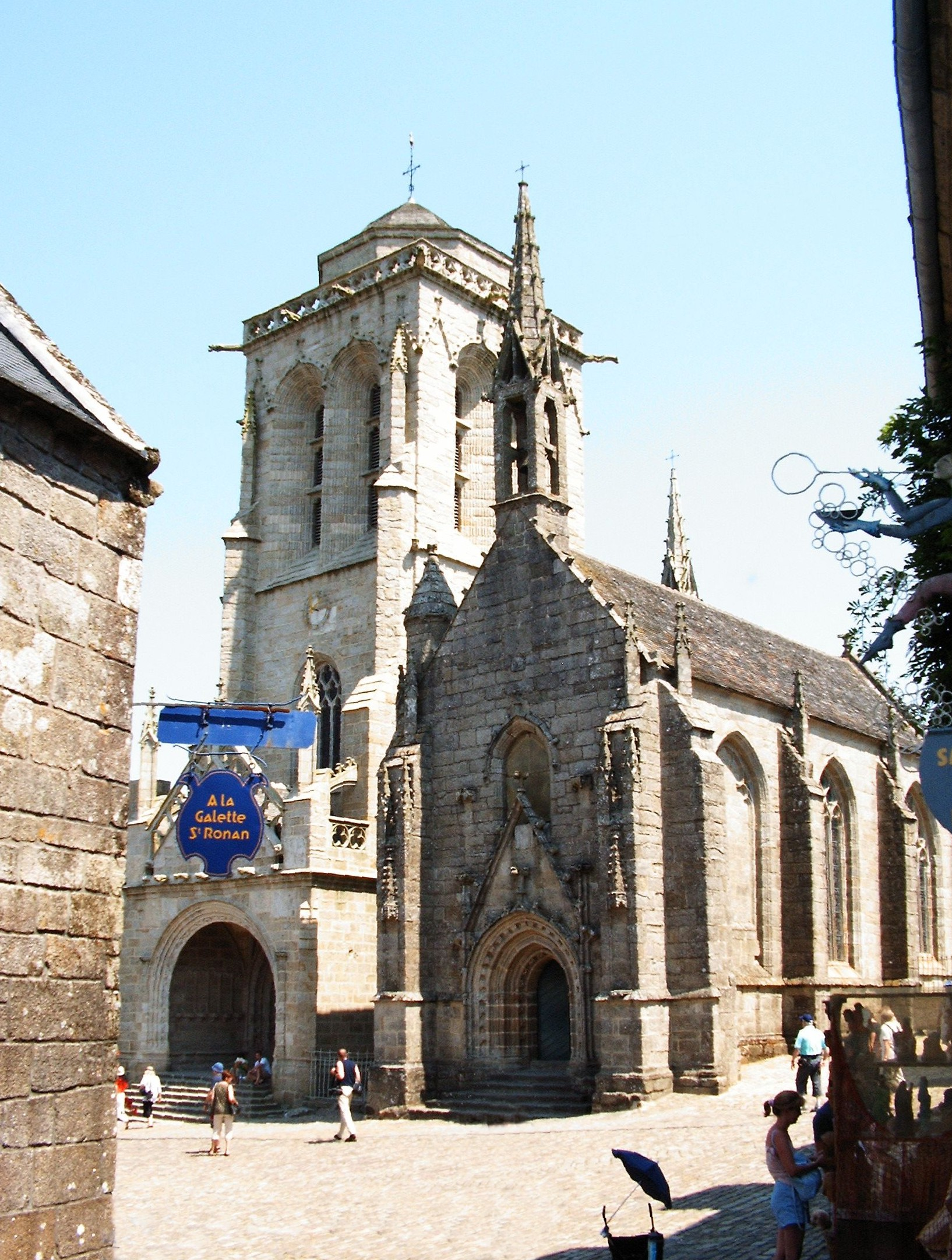 Église Saint-Ronan in Locronan, Finistére, Bretagne